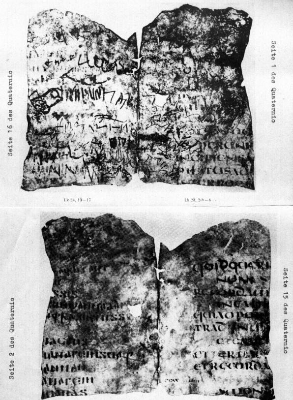 Codex Gissensis, Gothic-Latin manuscript of the New Testament